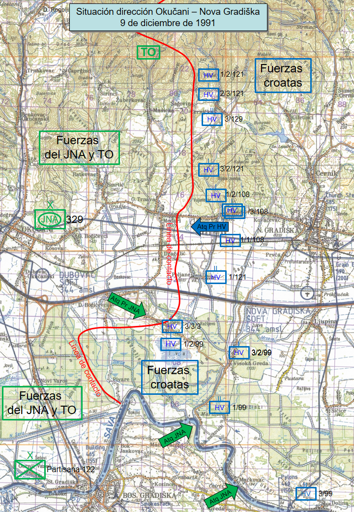 sobre la base de Martinić Jerčić, Natko (2014-12-11). «Oslobodilačke operacije hrvatskih snaga u Zapadnoj Slavoniji u jesen i zimu 1991./1992. godine» [Operaciones de liberación de las fuerzas croatas en Eslavonia occidental en el otoño y el invierno de 1991/1992]. Tesis doctoral (en croata) (University of Zagreb. Department of Croatian Studies.).